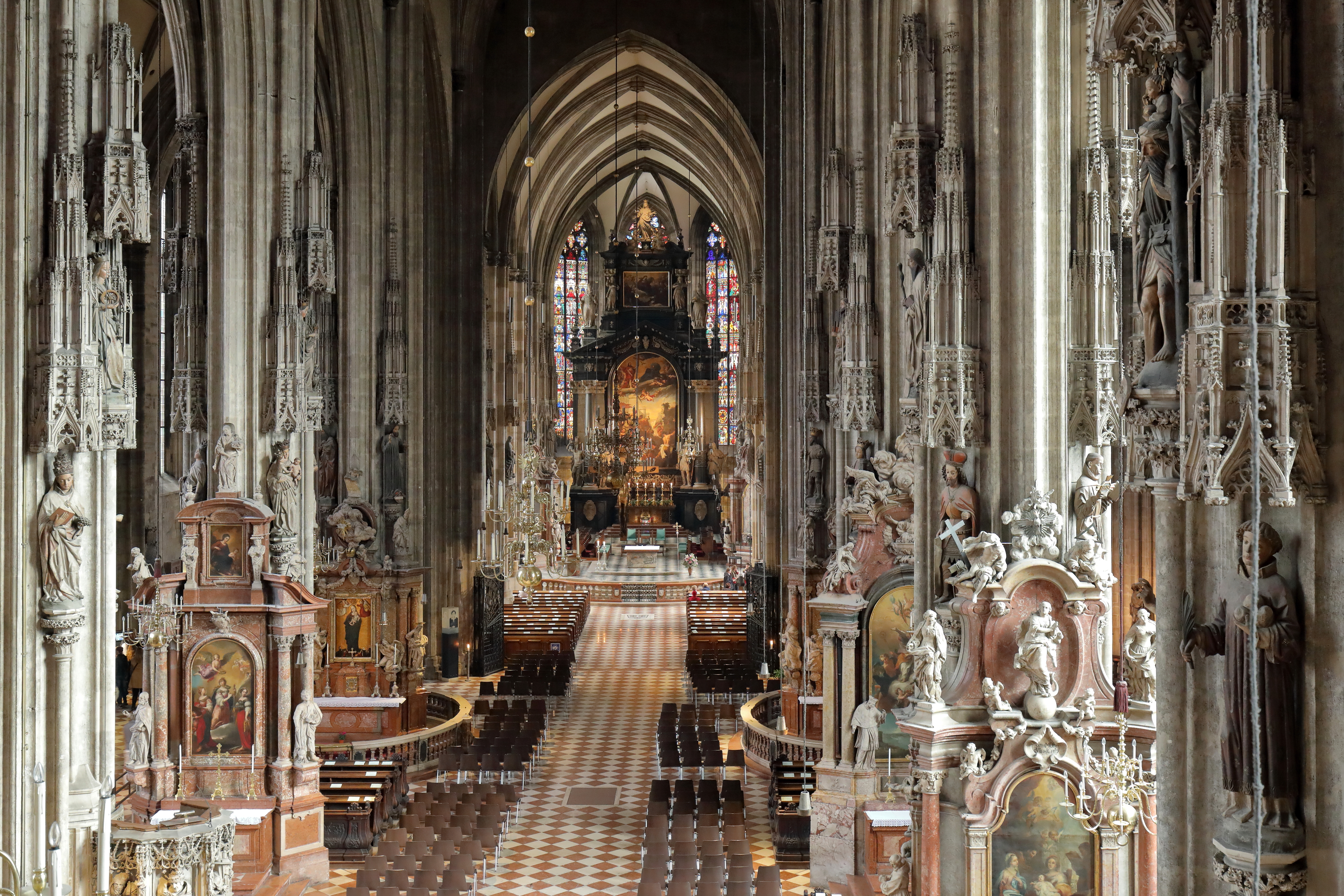 Blick von der Empore über das Mittelschiff zum Hochaltar im Stephansdom in der österreichischen Bundeshauptstadt Wien.Das gotische dreischiffige Langhaus wurde über einer Vorgängerkirche im 15. Jahrhundert errichtet. Der am 19. Mai 1647 geweihte Hochaltar des Doms ist ein frühbarockes Meisterwerk aus Marmor und Stein. Er wurde von dem Steinmetzmeister, Bildhauer und Architekten Johann Jacob Pock errichtet und sein Bruder, Tobias Pock, malte das Altarbild. Die Kanzel (links unten im Bild) ist ein Meisterwerk der spätgotischen Plastik aus Breitenbrunner Kalksandstein und wurde Anfang des 16. Jahrhunderts realisiert.